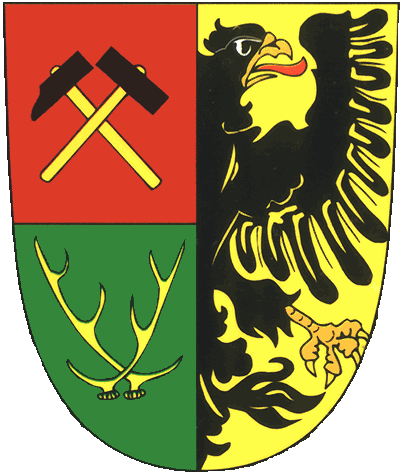 Svoboda nad Upou